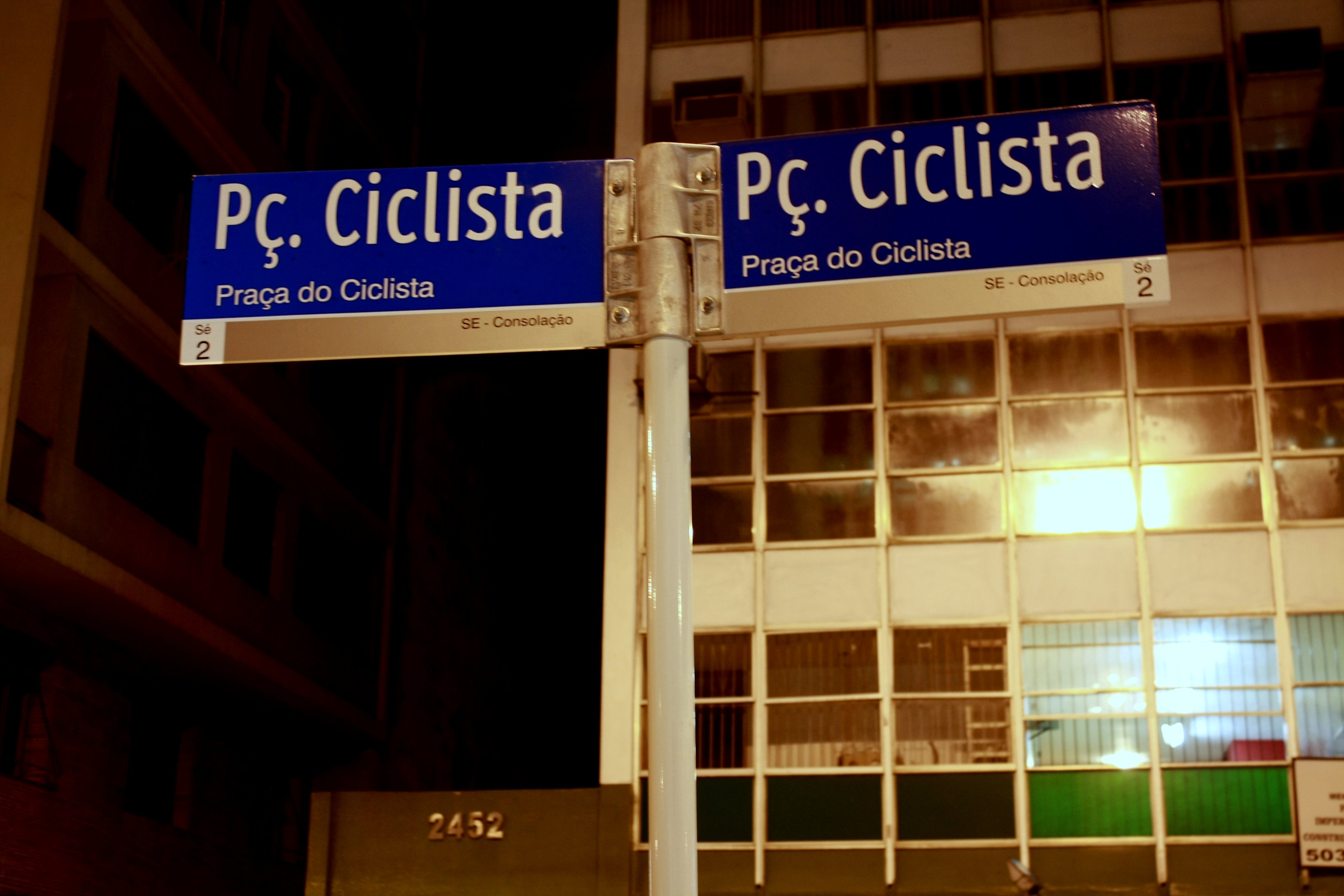 Placa da Praça do Ciclista